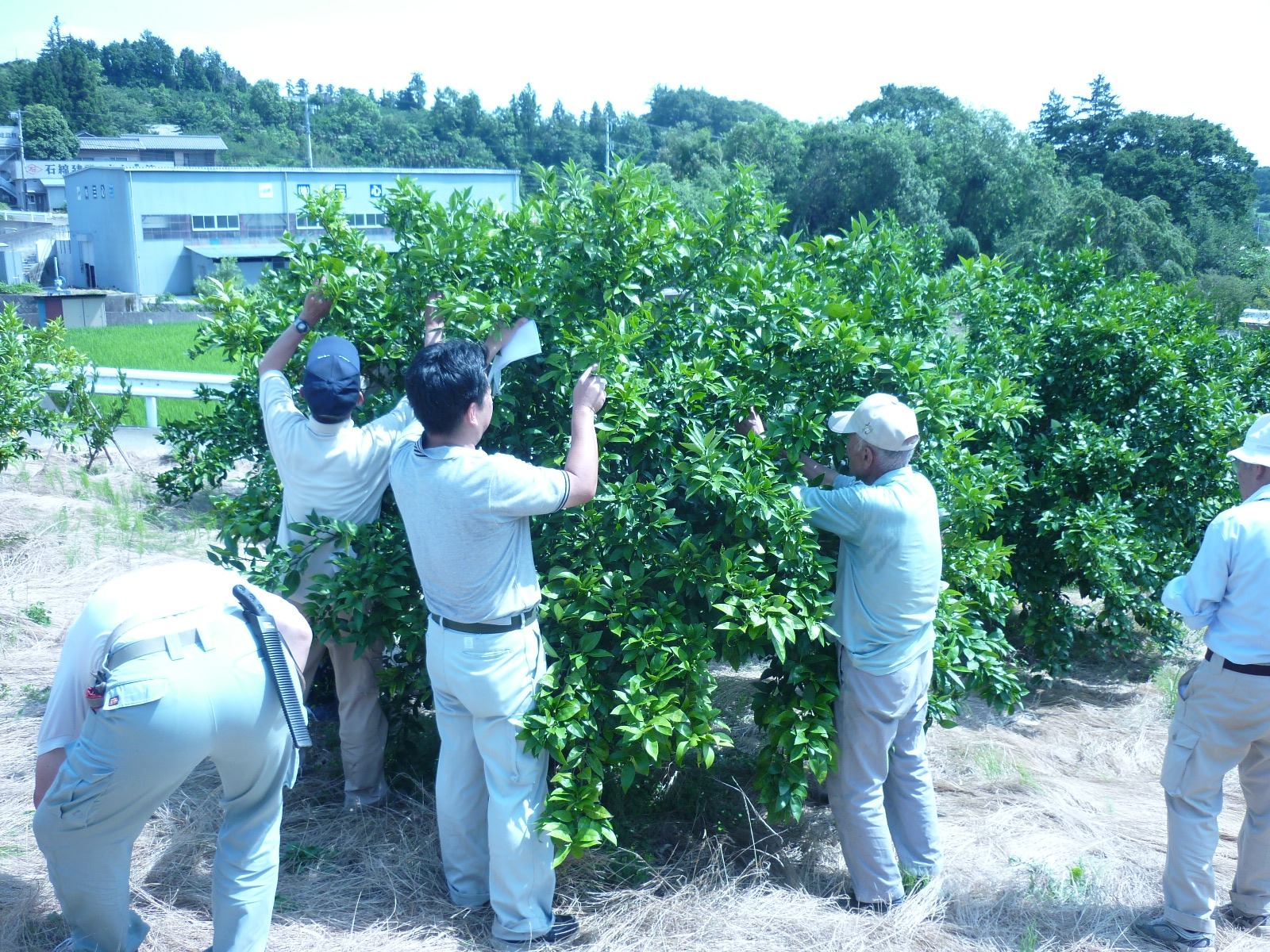 SGシンニング